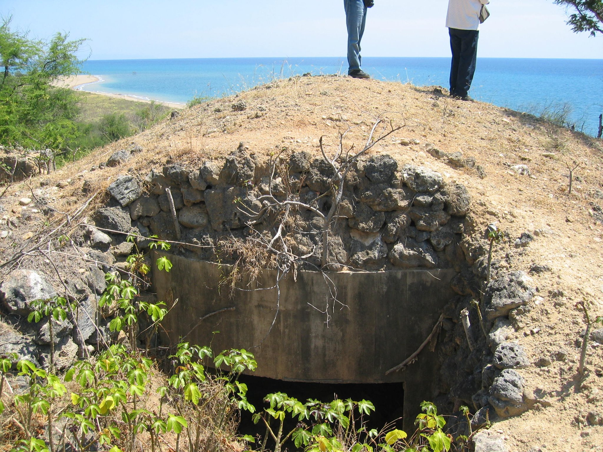 Japanischer Bunker in Lautém/Osttimor